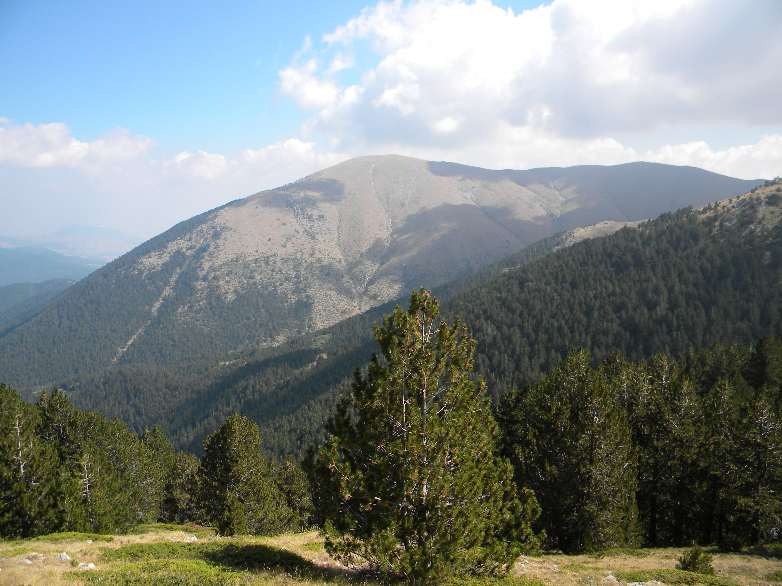 Голям Царев връх